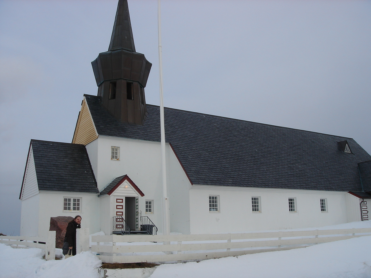 Gamvik kirke, Gamvik Church